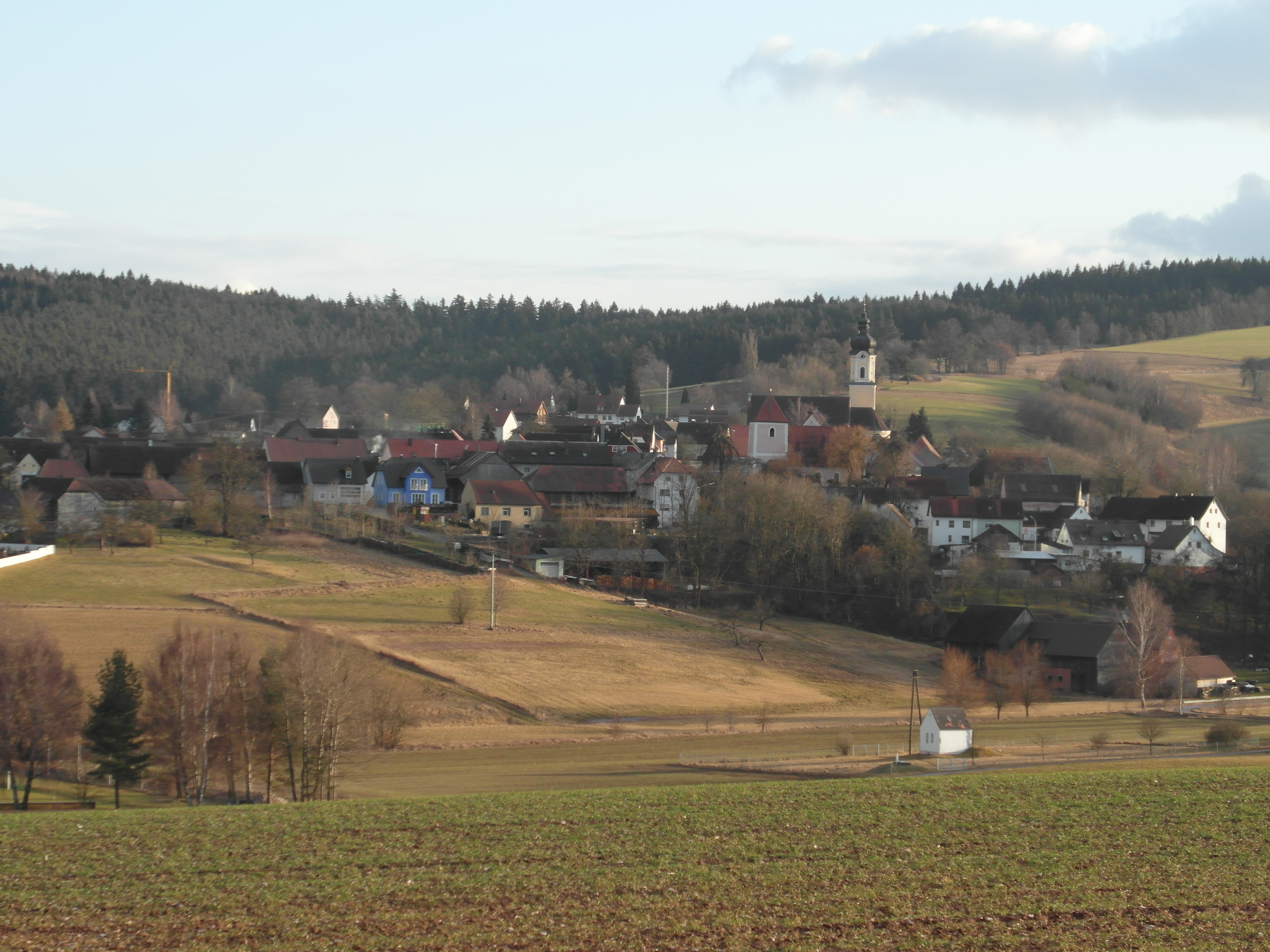 Ortsansicht Kohlberg (Oberpfalz) von Norden